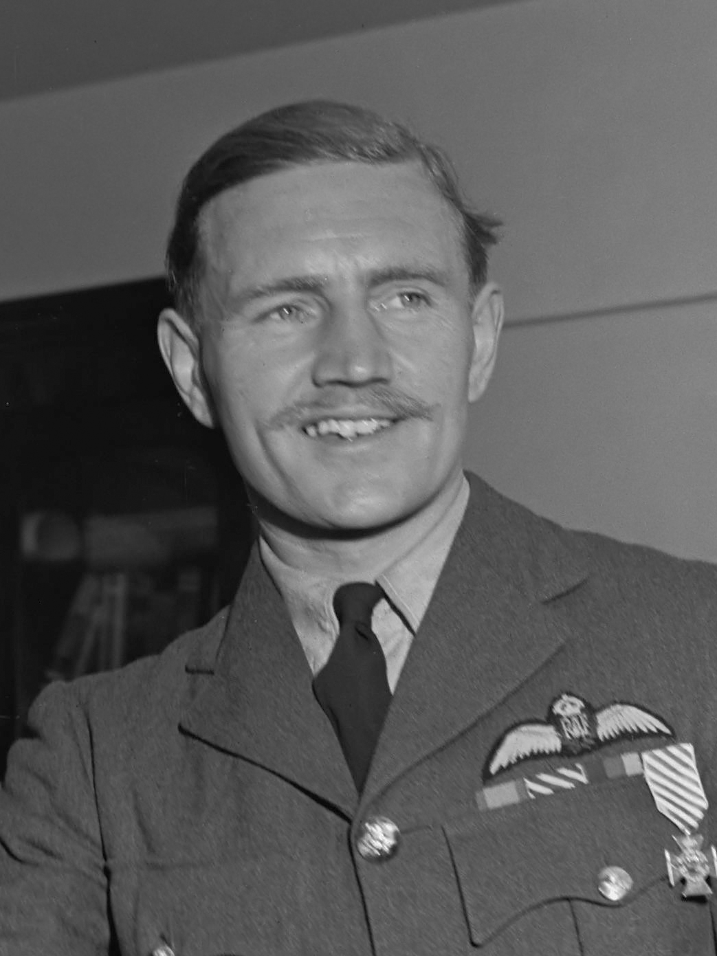 Uitreiking van het Vliegerkruis door prins Bernhard aan de Britse RAF-vlieger, Wing Commander R.N. Bateson. Bateson voerde het bevel over een formatie Mosquito-jachtbommenwerpers bij de aanval op Huize Kleykamp in Den Haag in april 1944. 1944